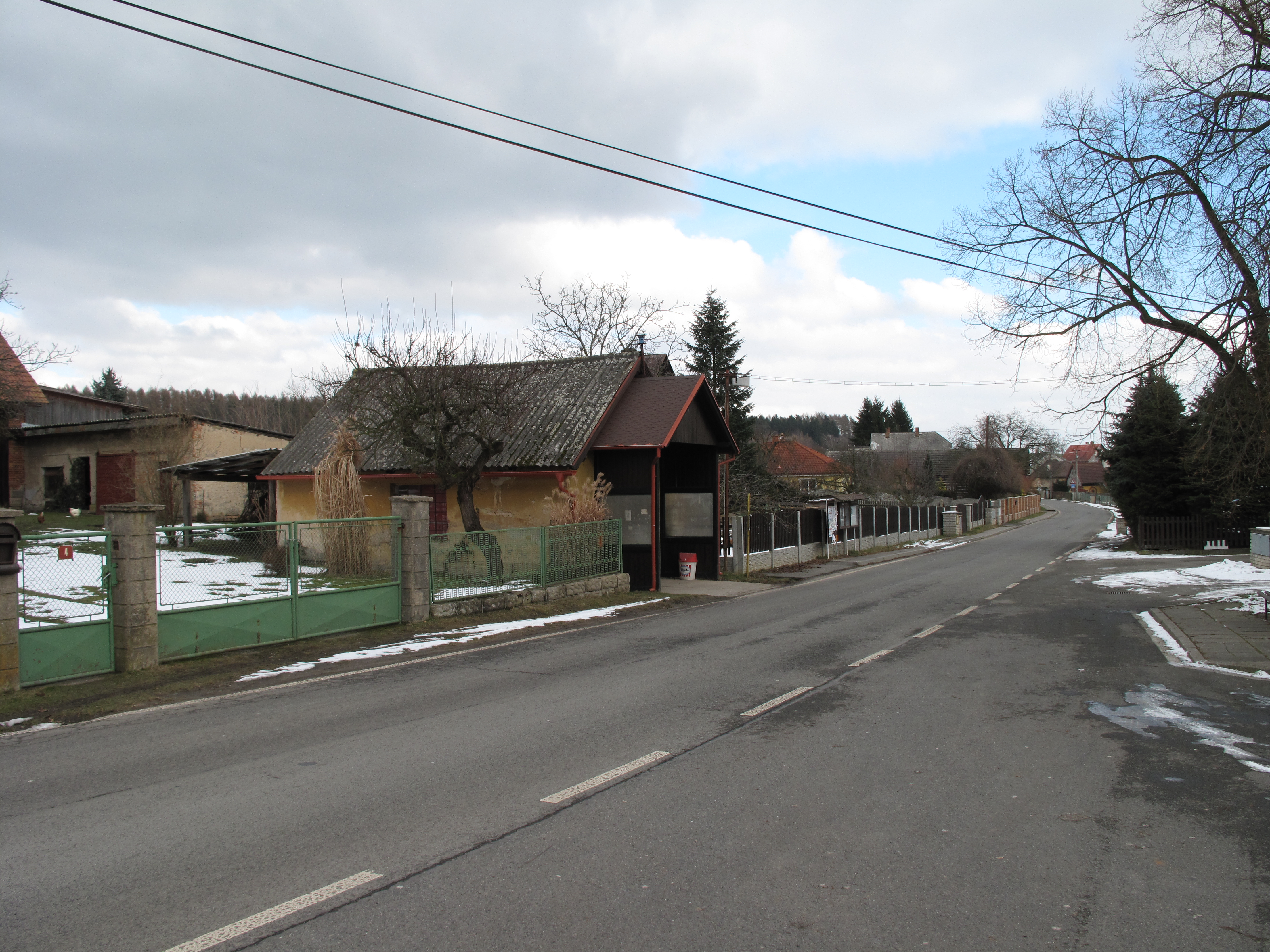 Silnice v Nové Teliby. Okres Mladá Boleslav, Česká republika.